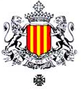 Armoiries de Forcalquier